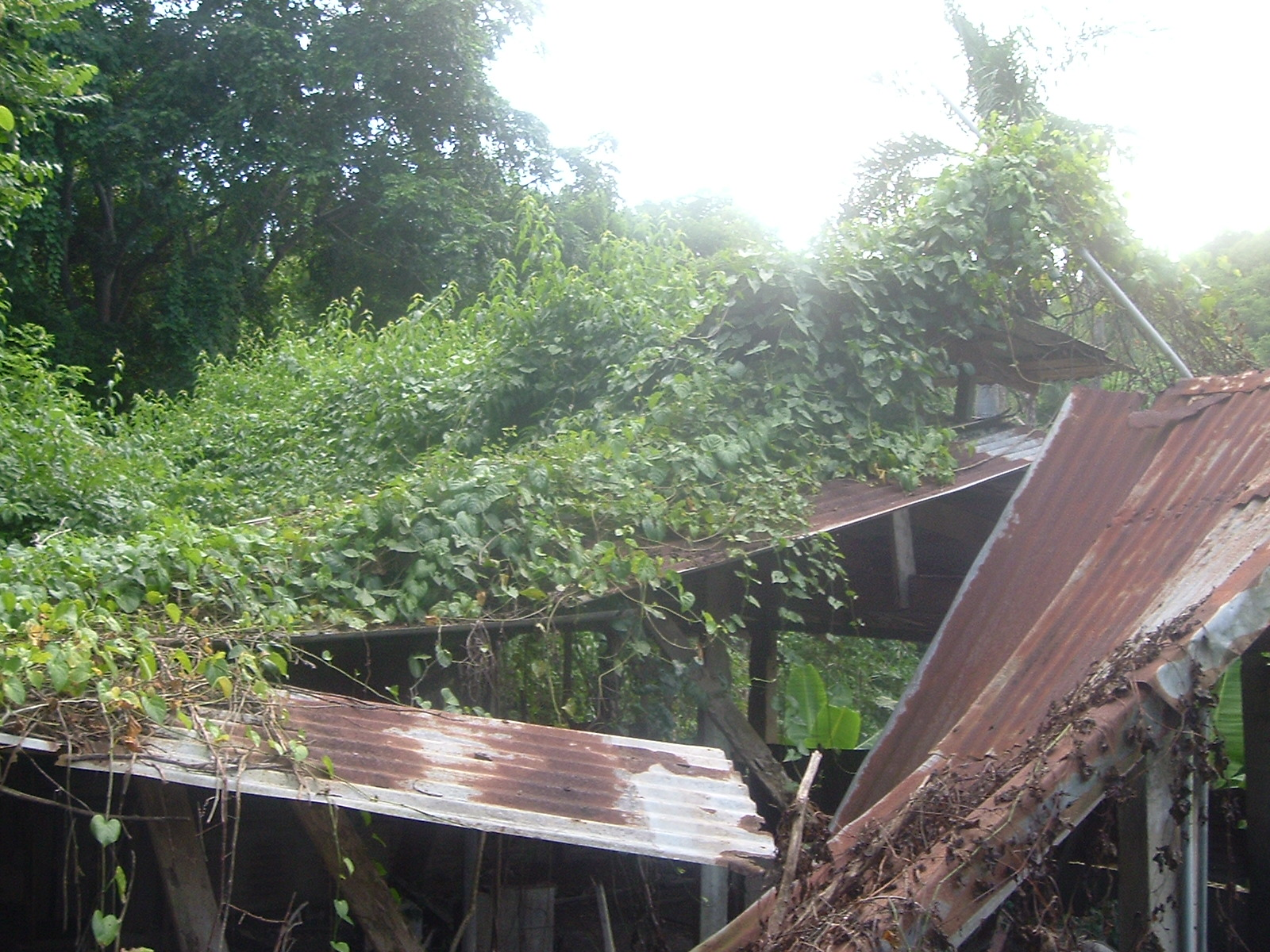 Una planta trepadora sobre una estructura abandonada.